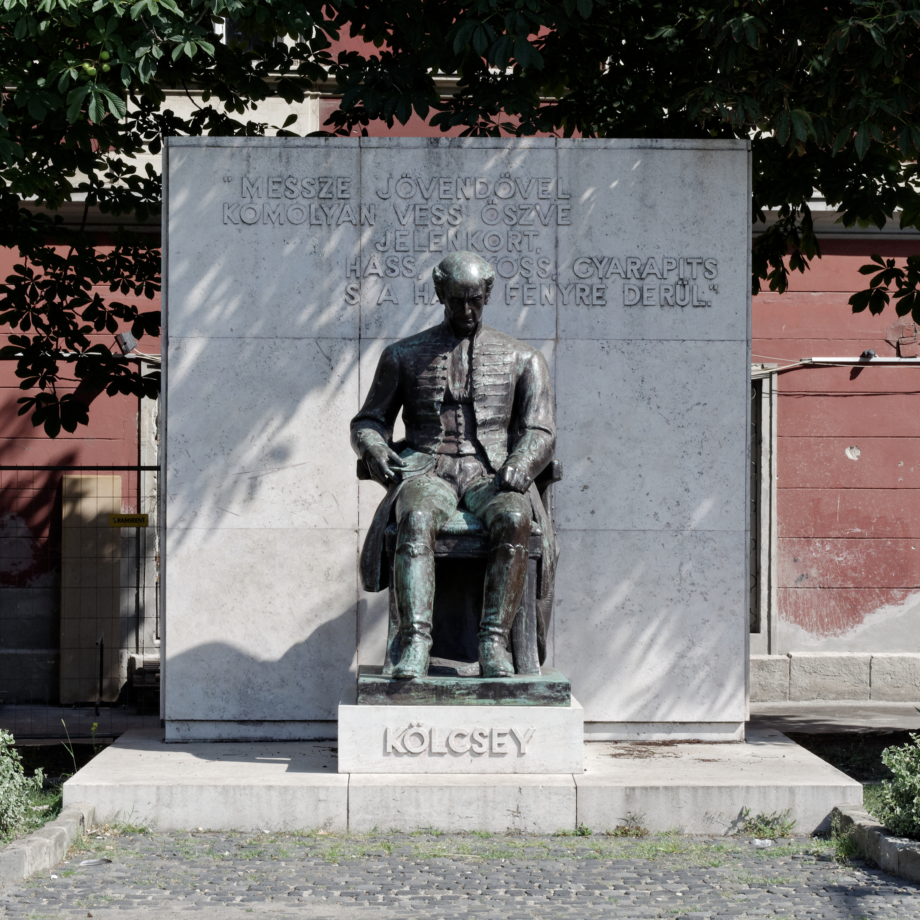 Statue de Ferenc Kölcsey (1790-1838), Place Batthany à Budapest